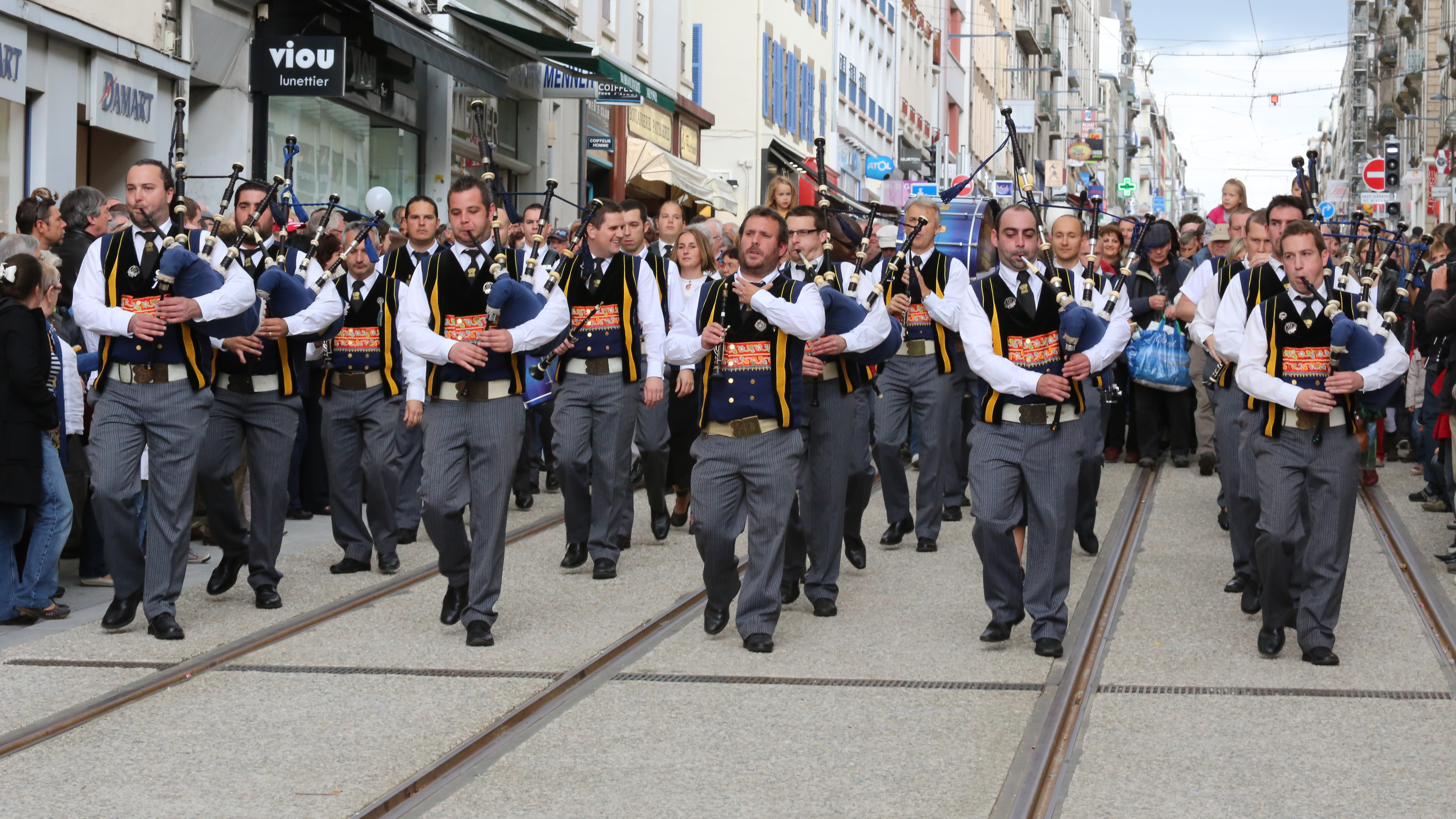 Photo de la parade du printemps des sonneurs le 19 mai 2012 à Brest